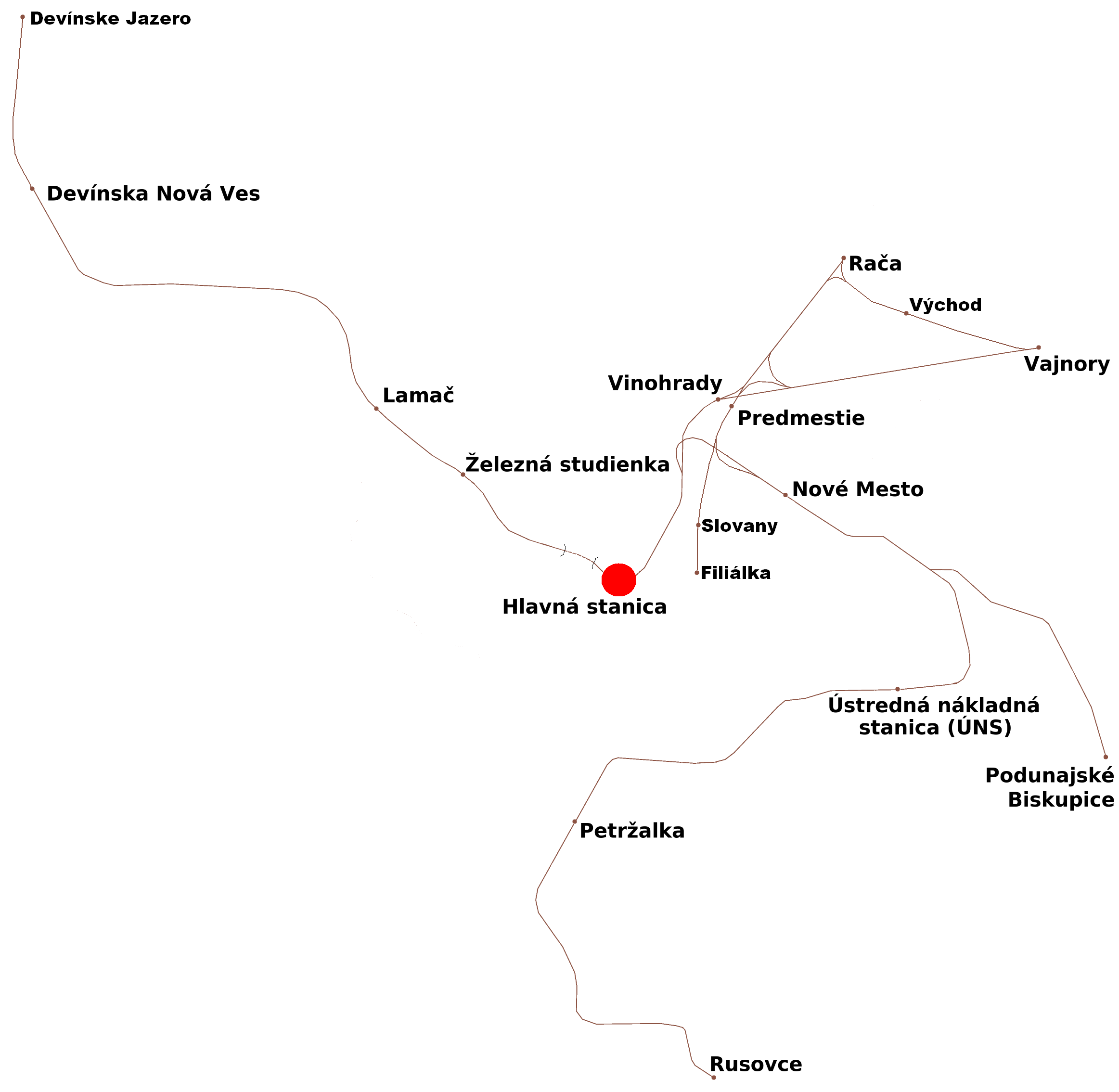 SK - Lokalizácia železničnej stanice Bratislava hlavná stanica EN - Bratislava hlavná stanica/Main Station (Slovakia) Railway station locality.